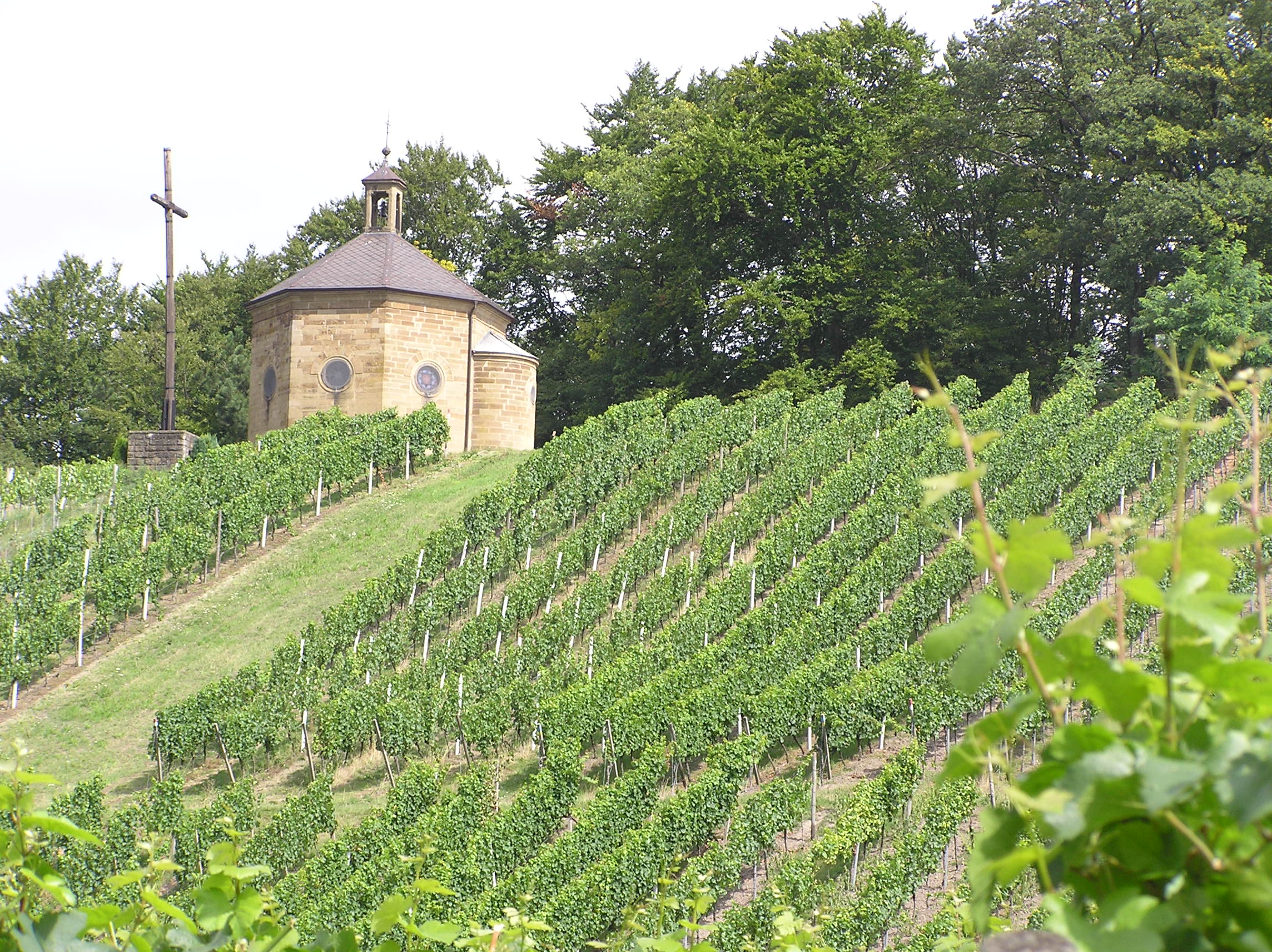 Kreuzbergkapelle in Tiefenbach, Östringen, Kraichgau